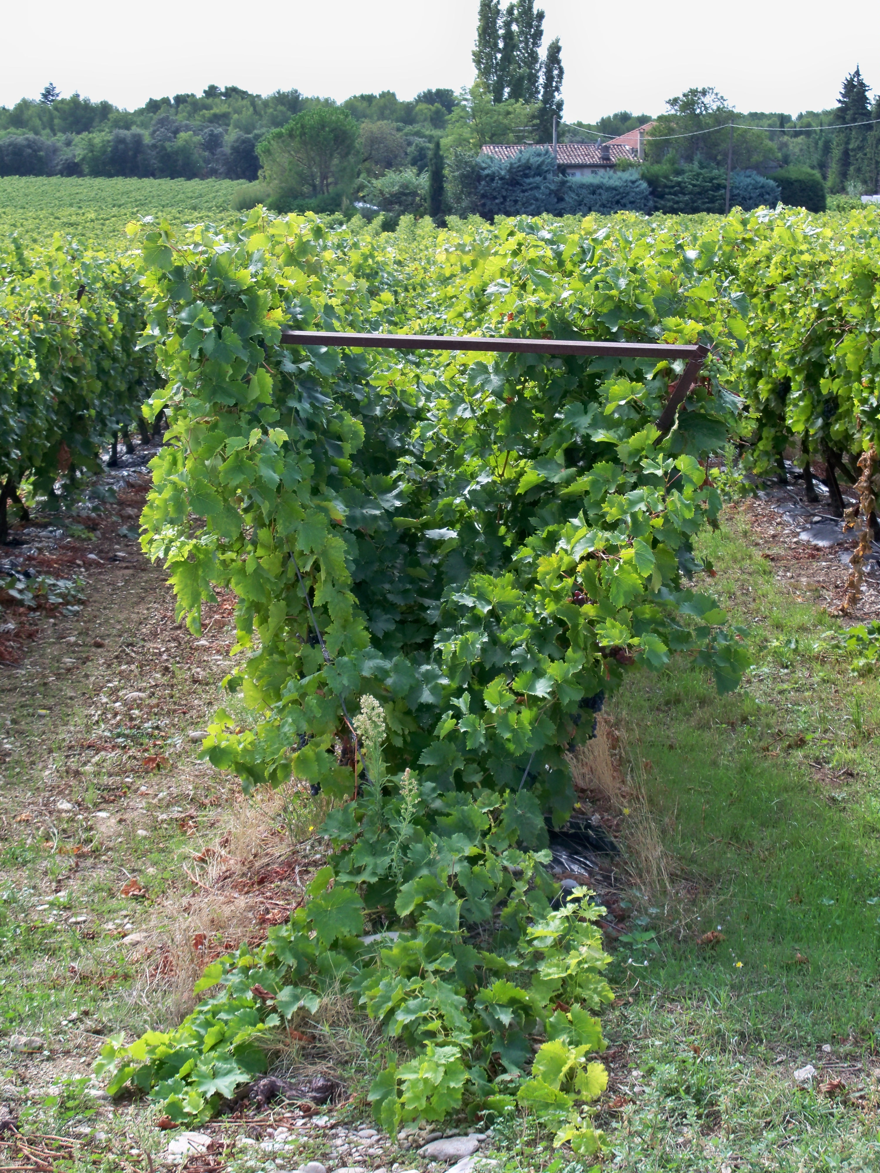 Vignes de raisins de table à Malemort du Comtat, Vaucluse, France